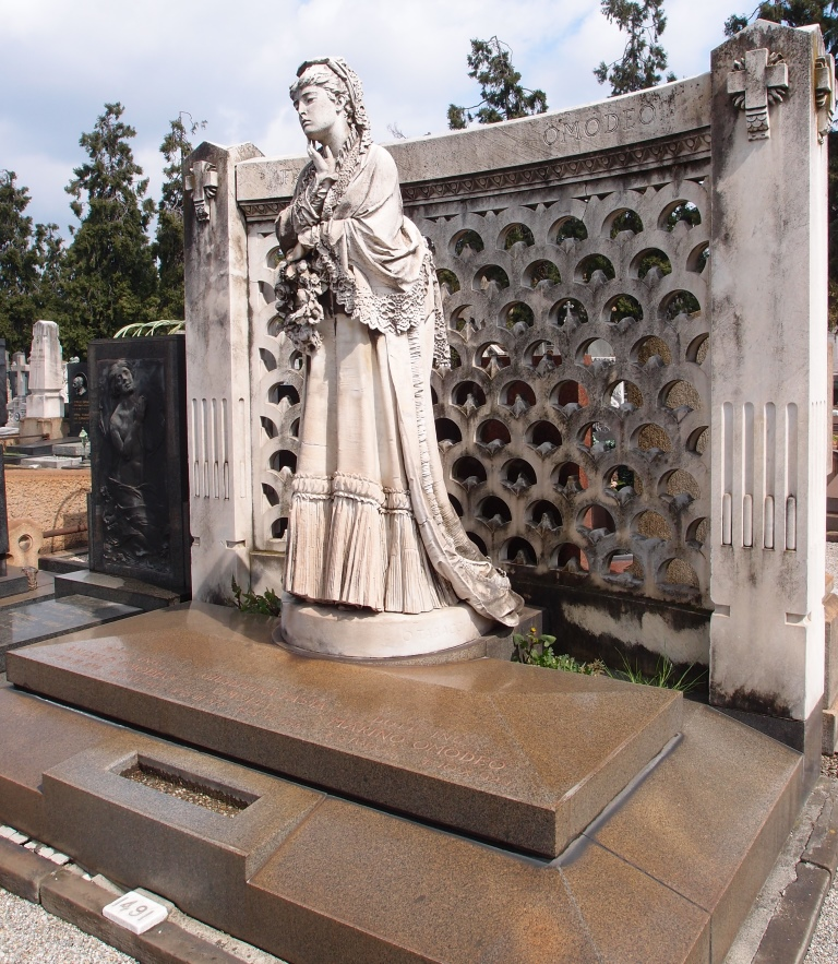 Milano, Cimitero monumentale, monumento Omodeo (scultore Odoardo Tabacchi 1876, architetto Guido Sartirana 1930).